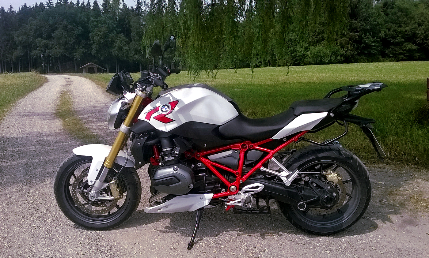 BMW Motorrad R 1200 R Modelljahr 2015 links